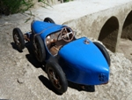 Papirovy model Bugatti 35B